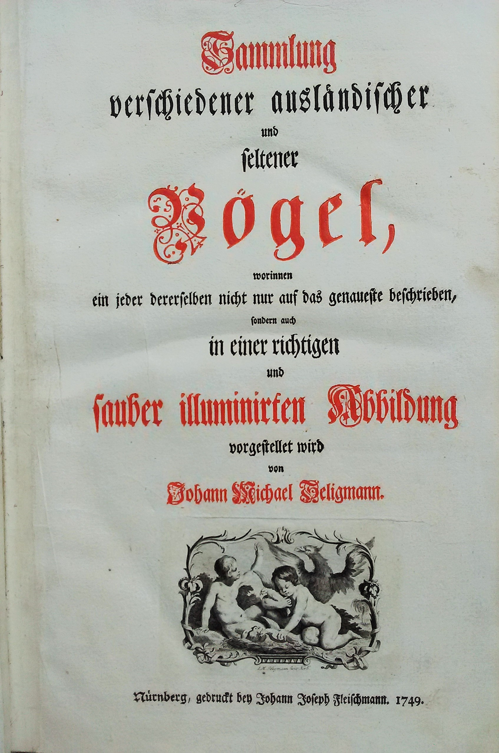 Grabado del primer tomo de la obra Sammlung verschiedener ausländischer und seltener Vögel. Impreso en Nürnberg por editorial Seligmann en 1749